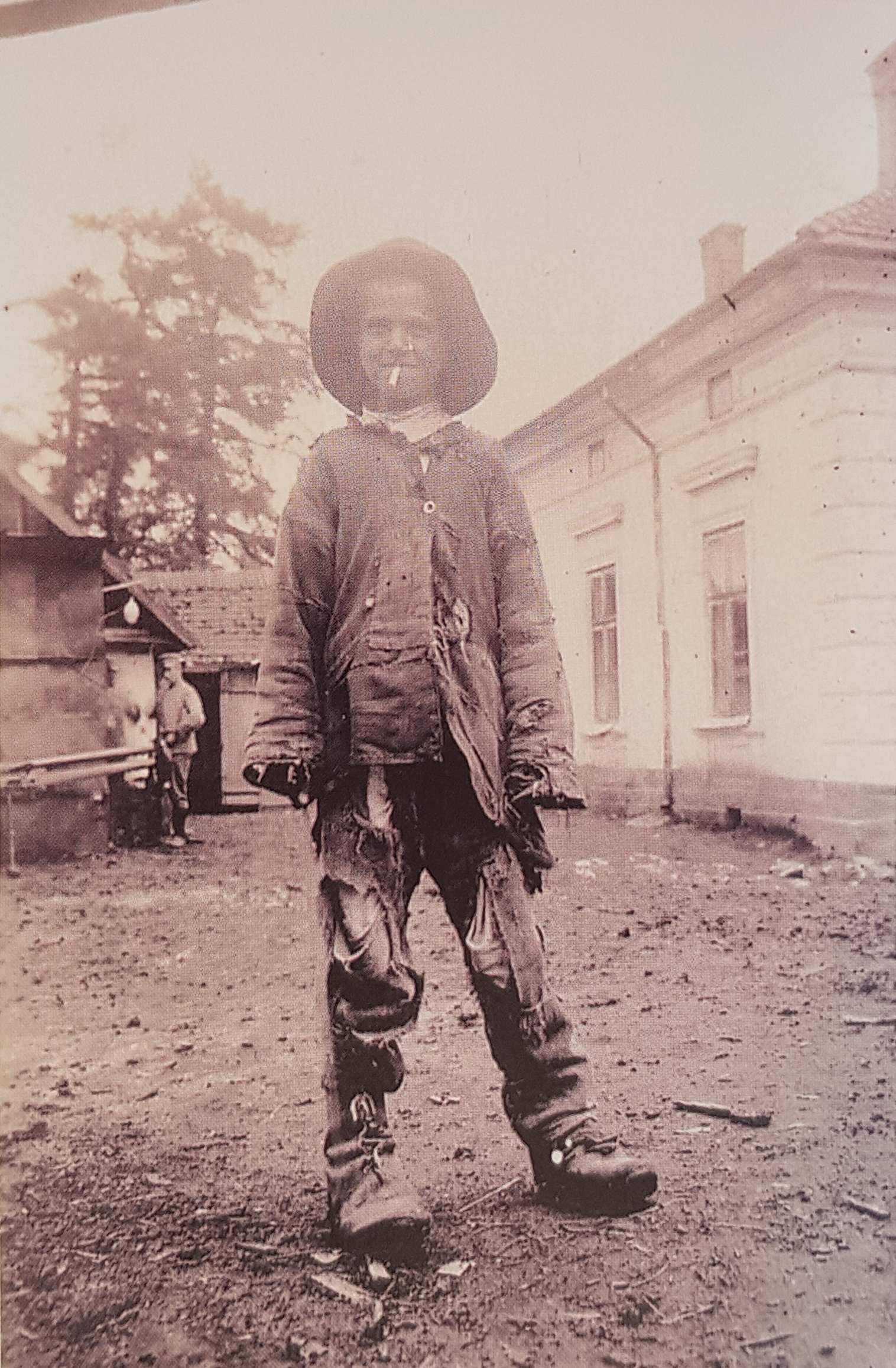 Беларуская (тарашкевіца): Пухавічы (Puchavičy). Хлопчык